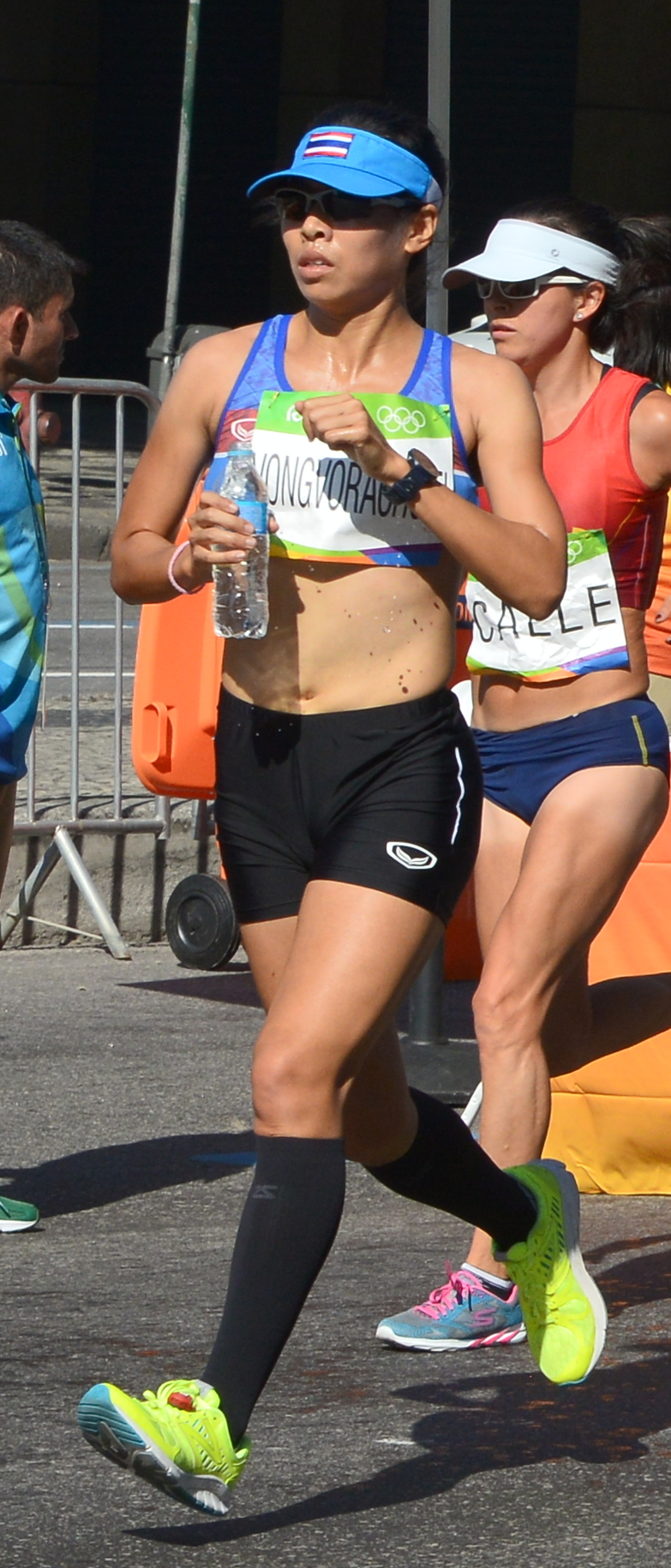 Passage du marathon des jeux olympiques de Rio 2016 dans le centre de Rio